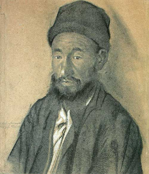 картина художника Девлеткильдеева Касима (1887—1947). Башкир-Ибрагим 1928